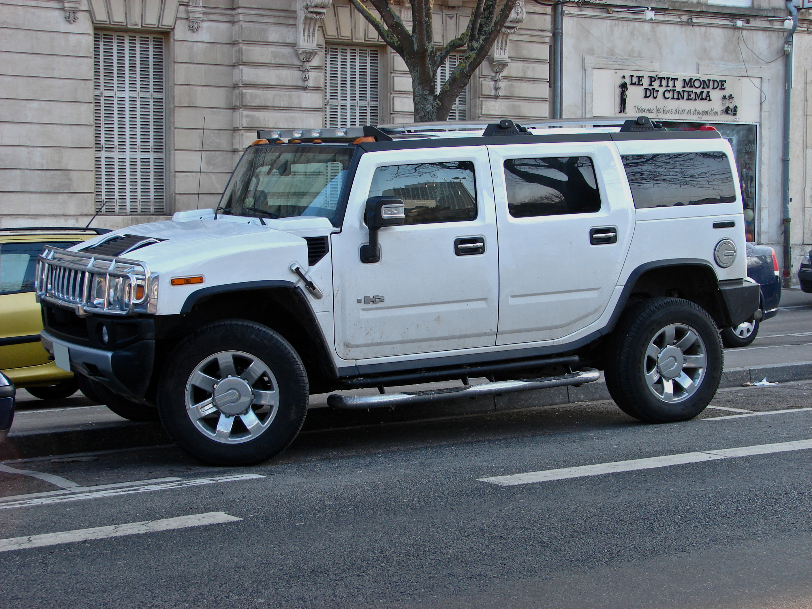 Hummer H2